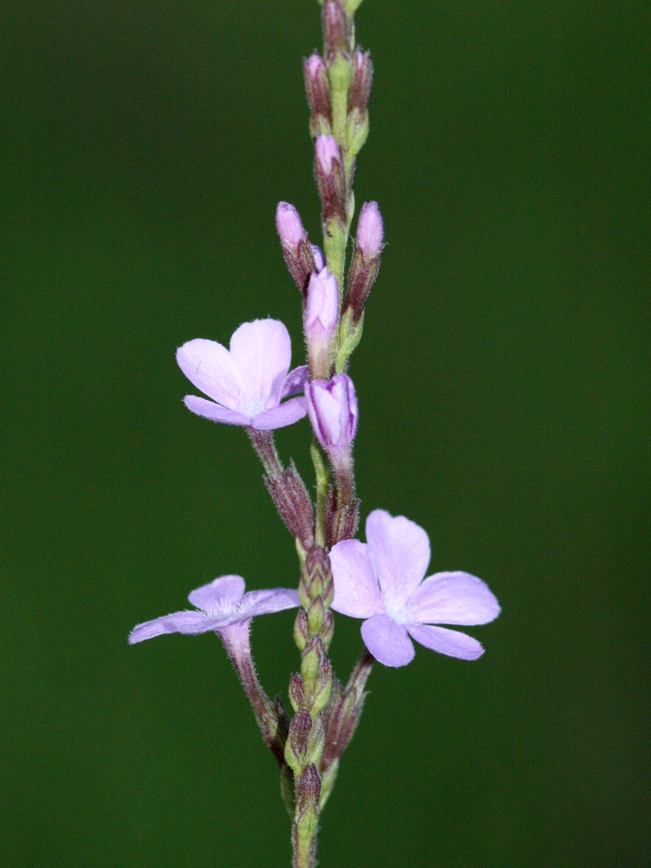 Kvetoucí bylina Tetrapollinia caerulescens, Rio Ventuari, Venezuela